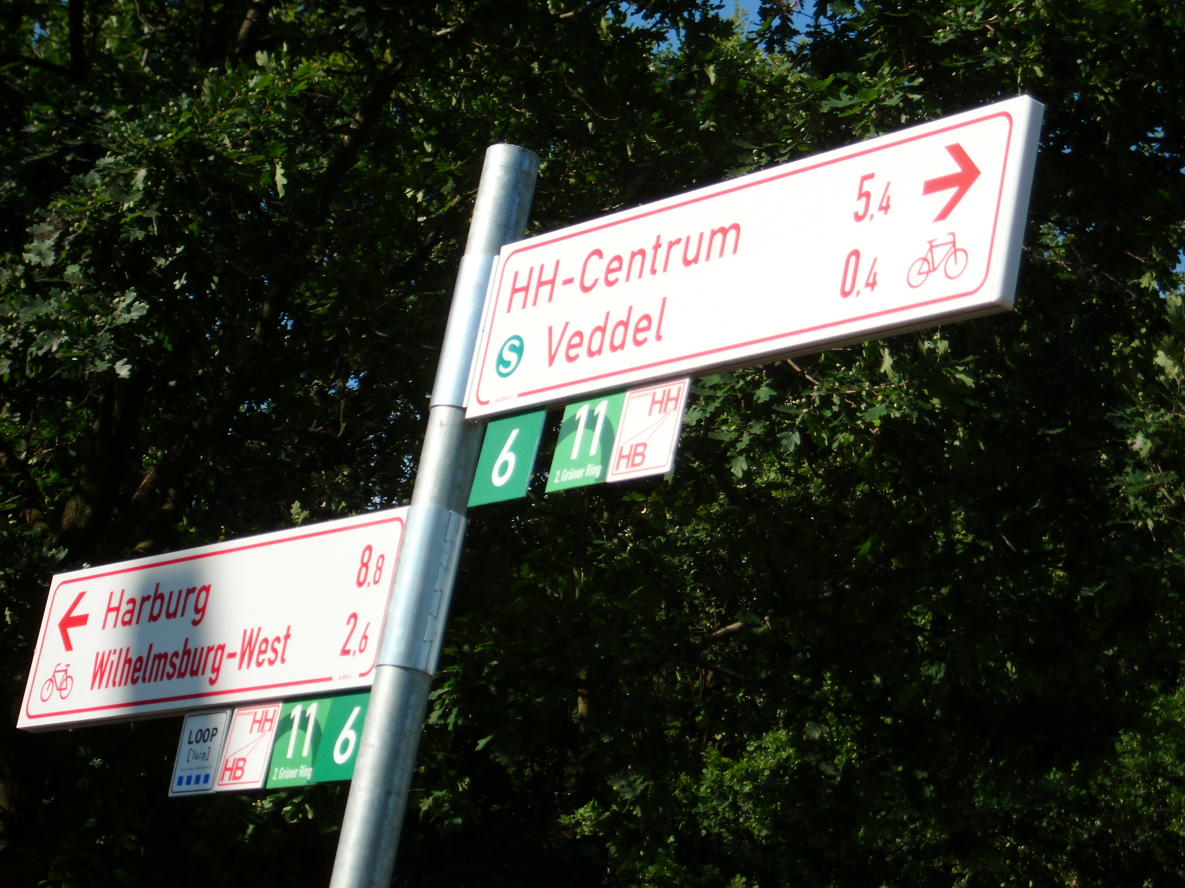 Typische Ausstattung des Rundkurses Loop, links unten das Logo des Loops